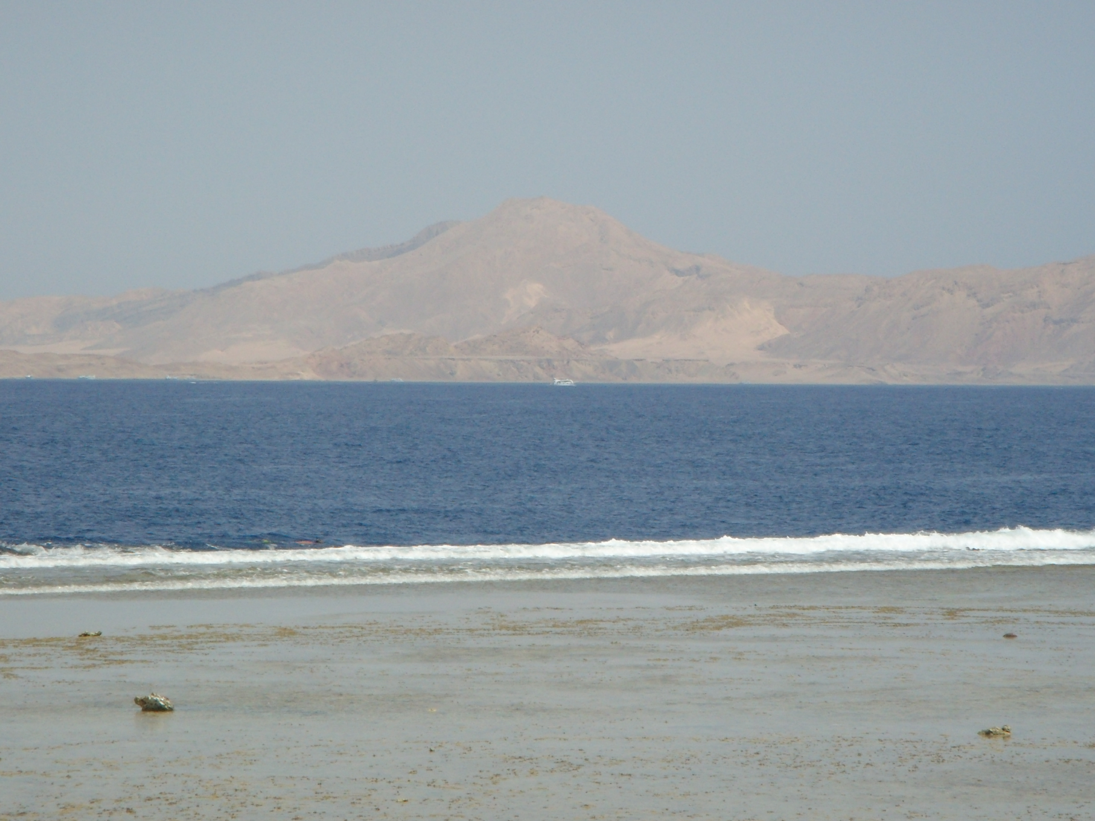 SHARM EL-SHEIKH.Wyspa Tiran.